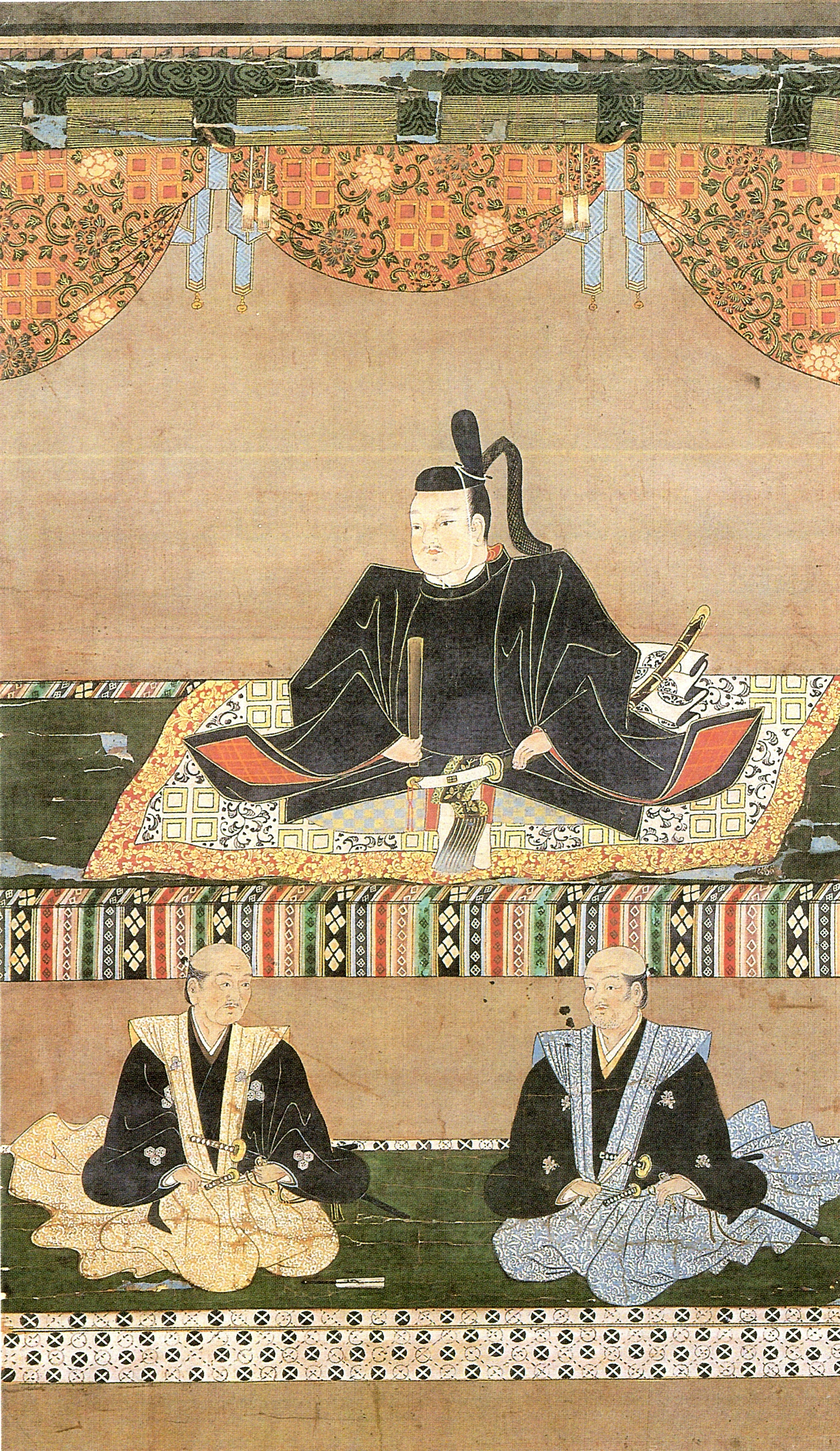 京極高三の肖像。